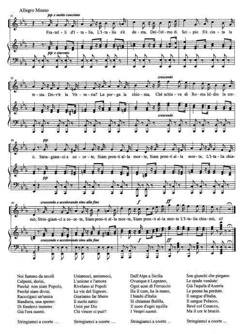 Fratelli d'Italia, 2. Teil